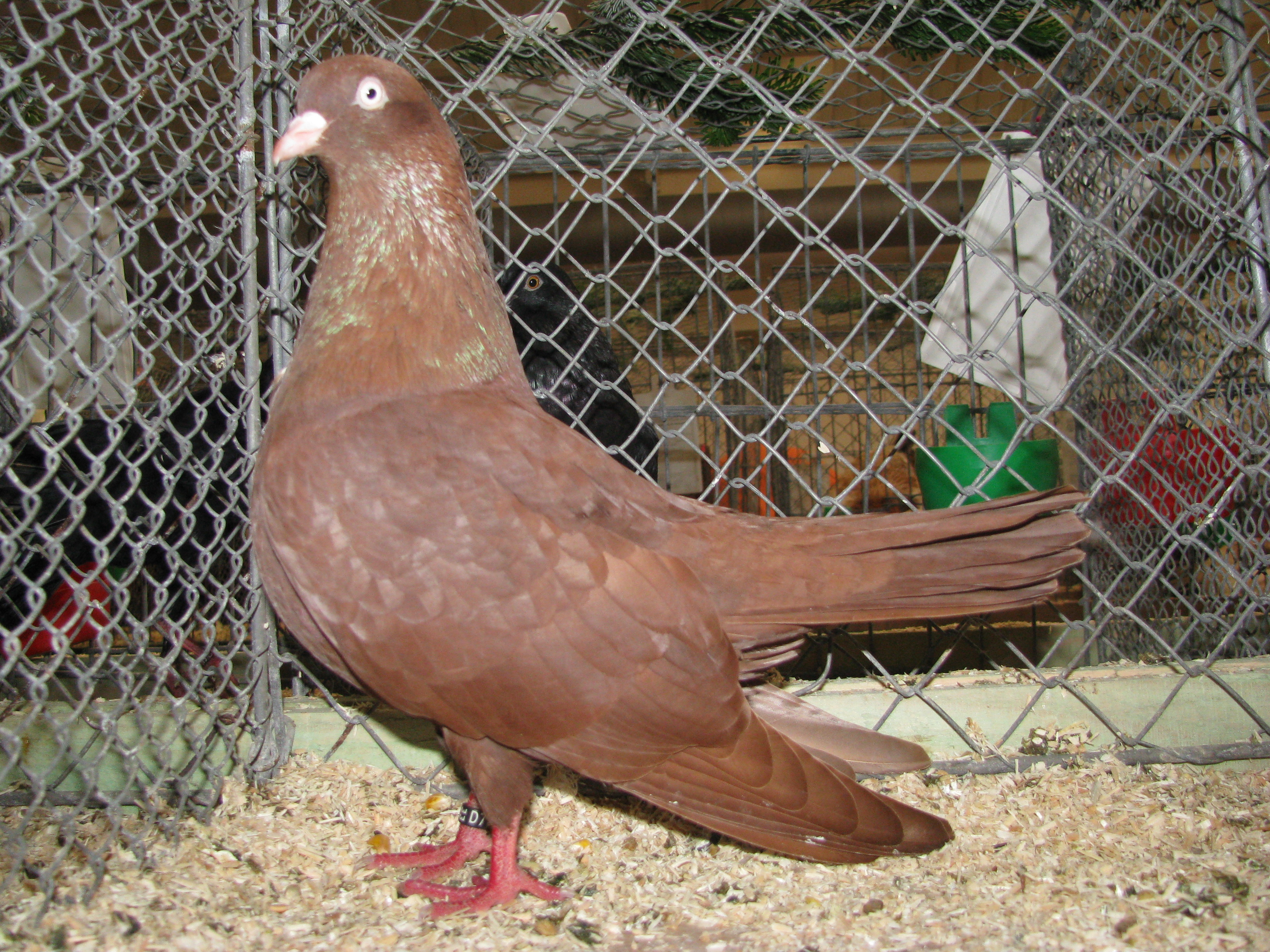 Orientalischer Roller, roter Farbschlag